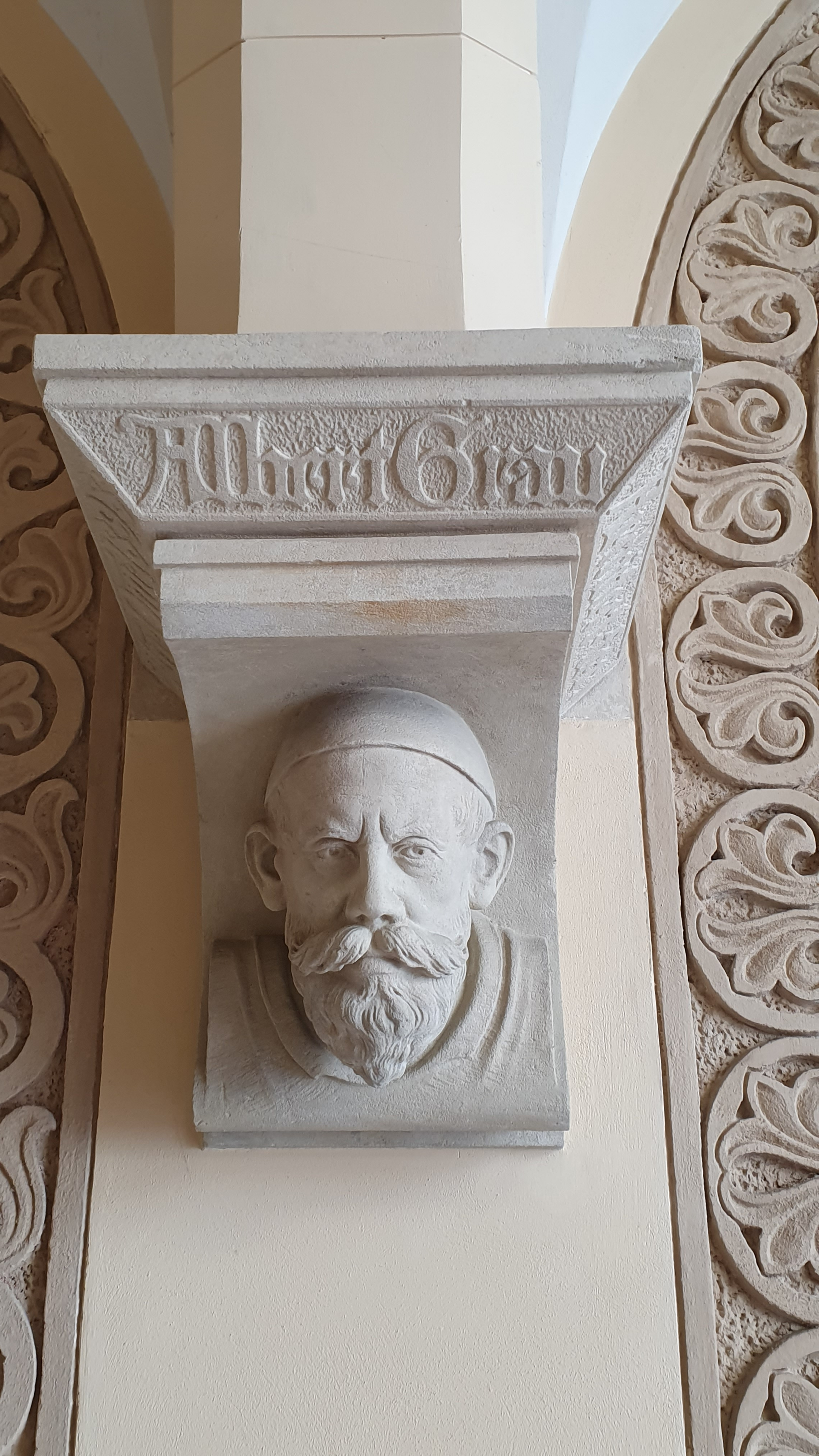 Pałac Ballestremów we Wrocławiu - detal, głowa projektanta Alberta Grau